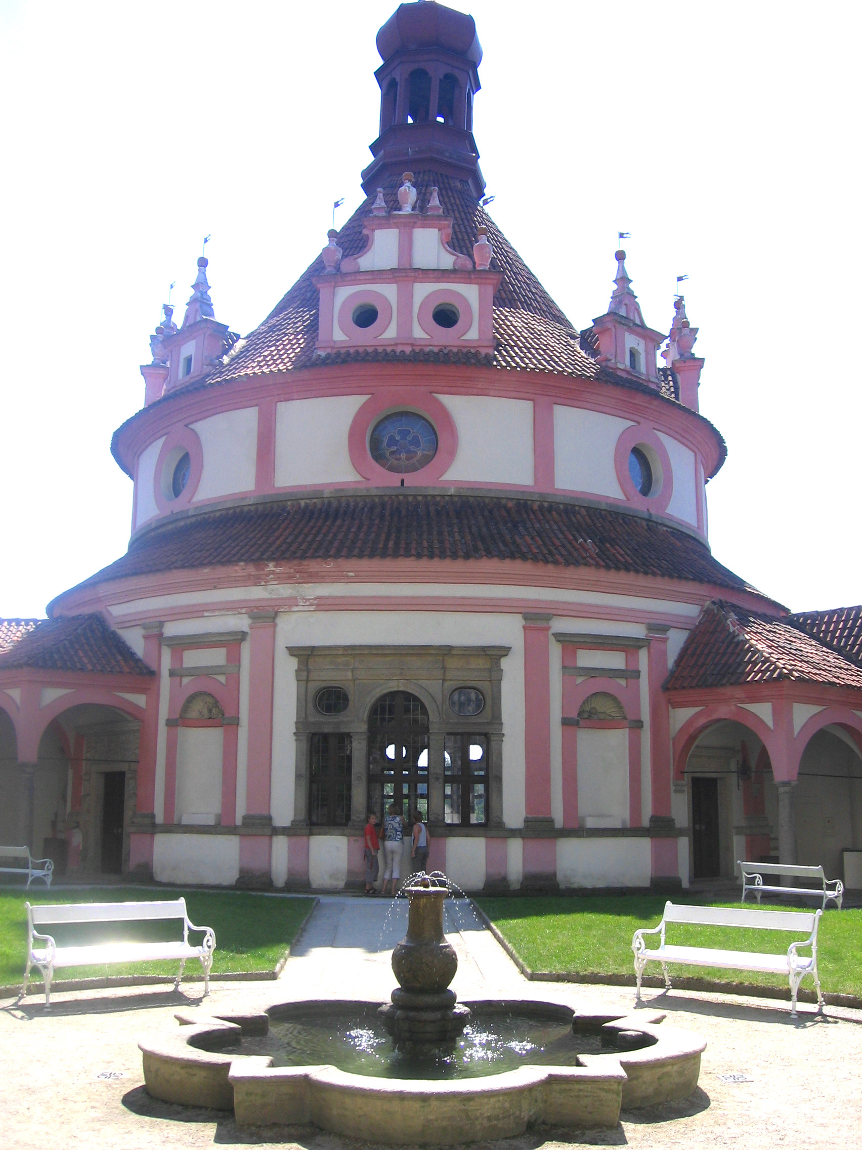 zámek Jindřichův Hradec